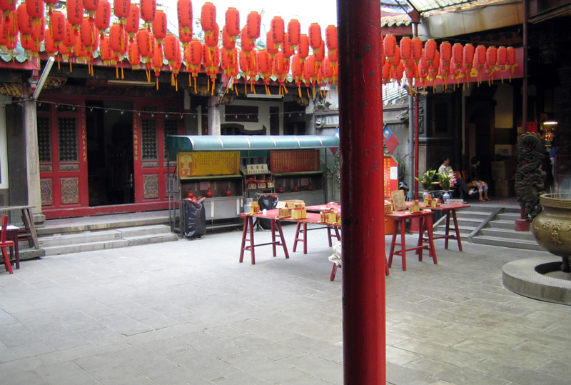 中埕廣場與左護龍剪影